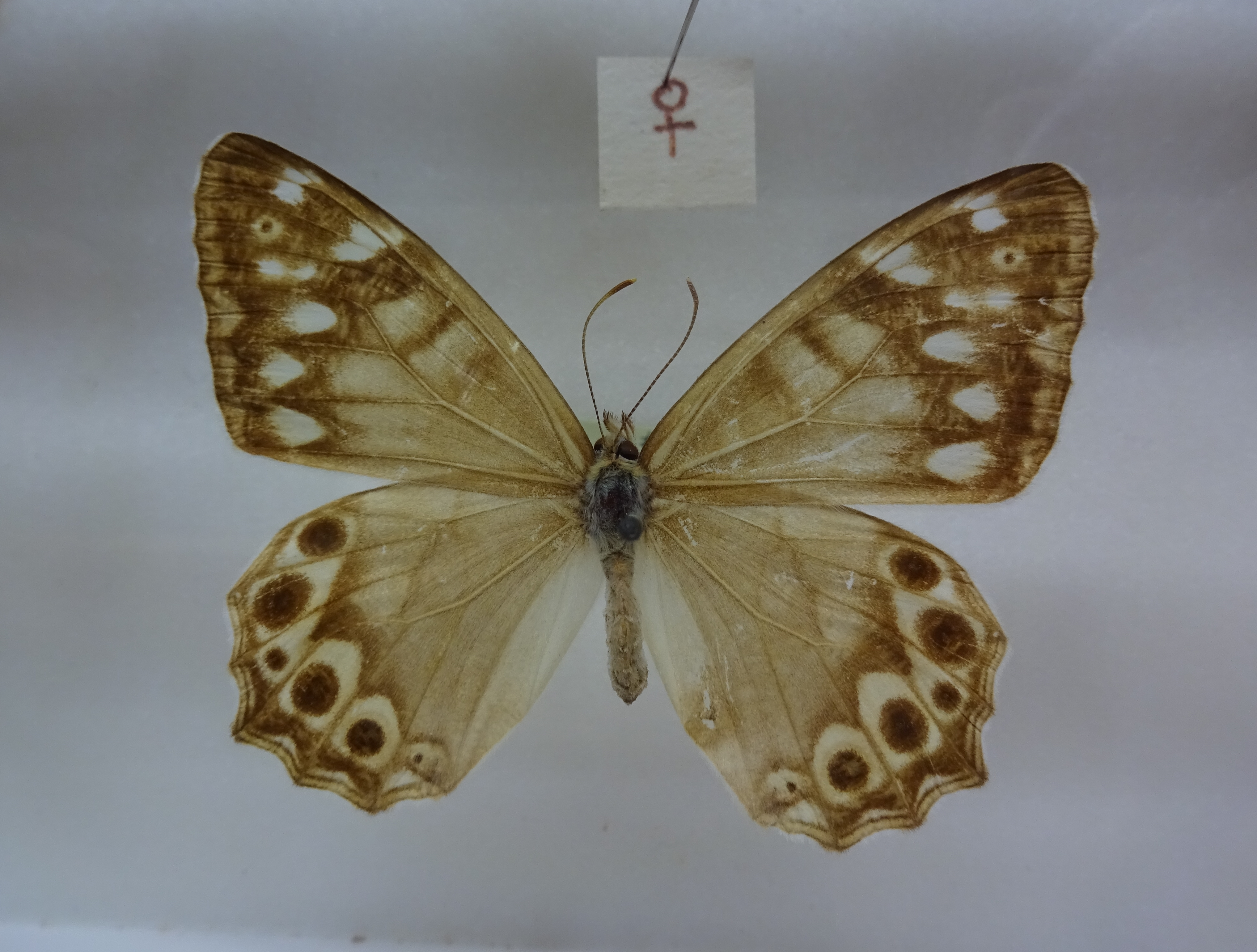 ヒメキマダラヒカゲ